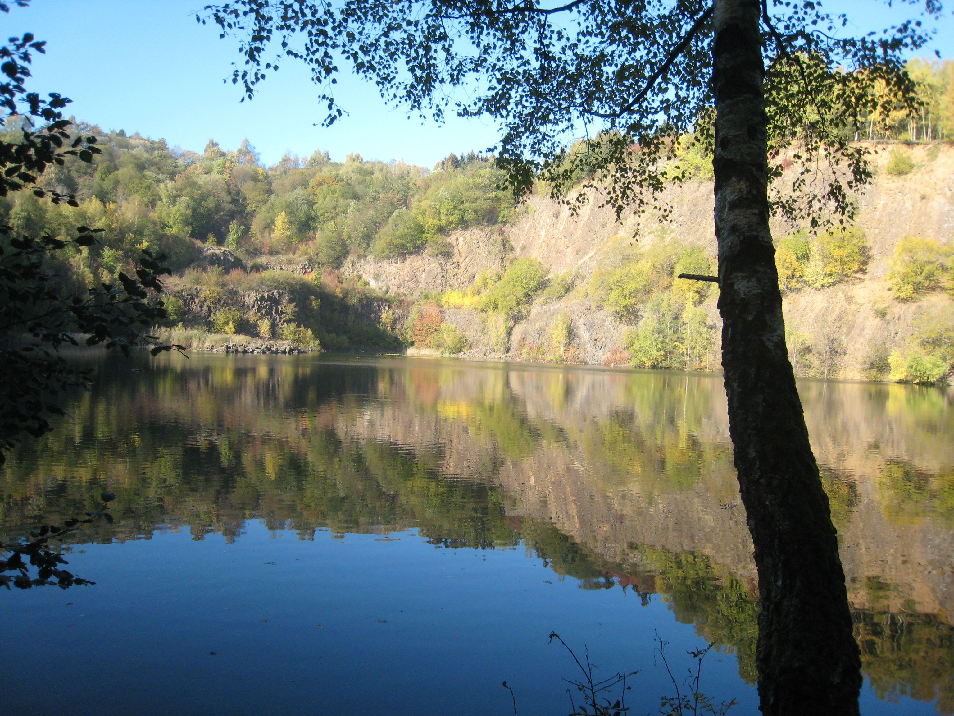 Basaltsee im Basaltpark